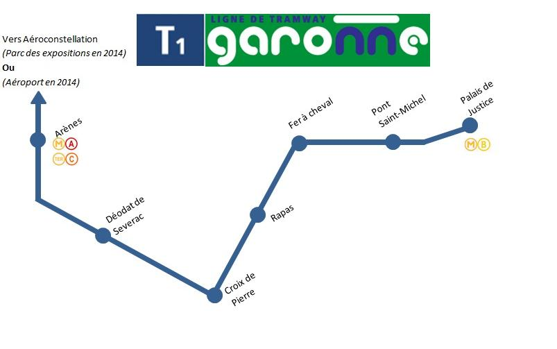 schéma de la ligne garonne, prolongement de la ligne T1 du tramway de toulouse